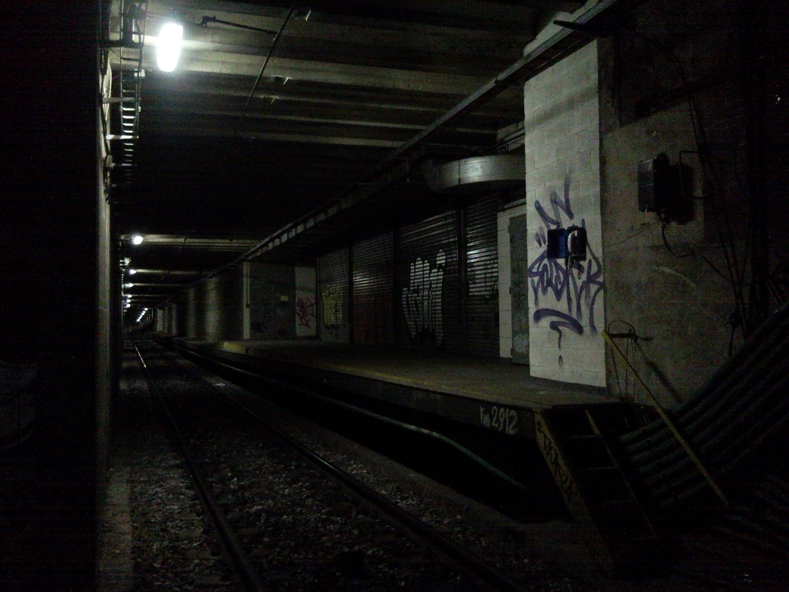 Estación abandoanda Alberti Norte